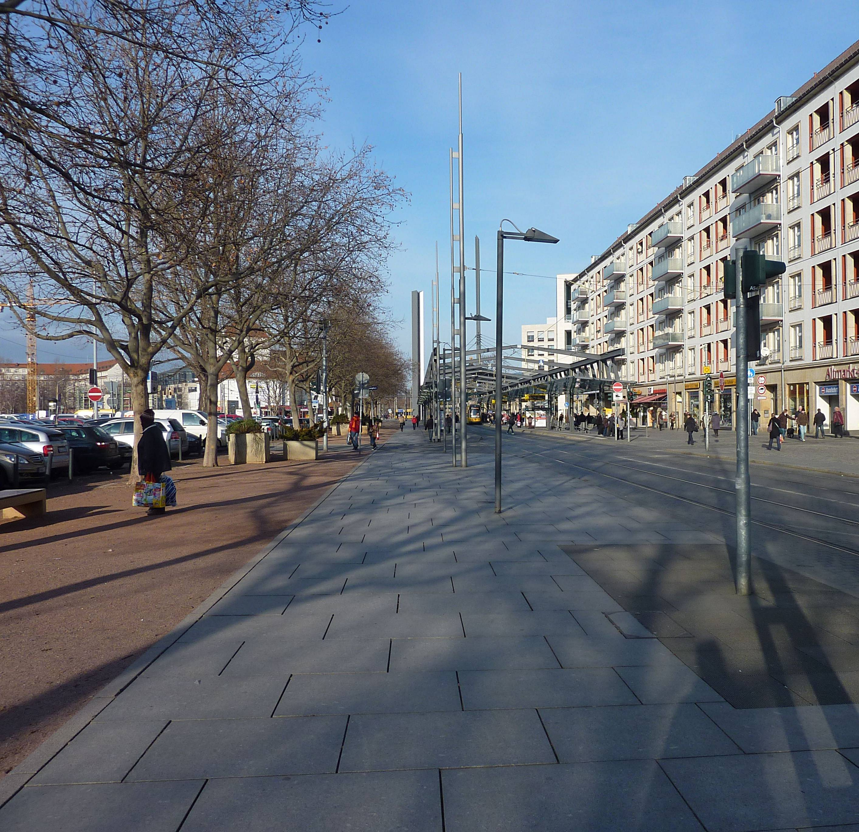 Wallstraße in Dresden, Blick zum Postplatz